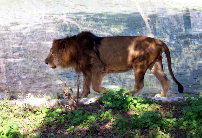 lion